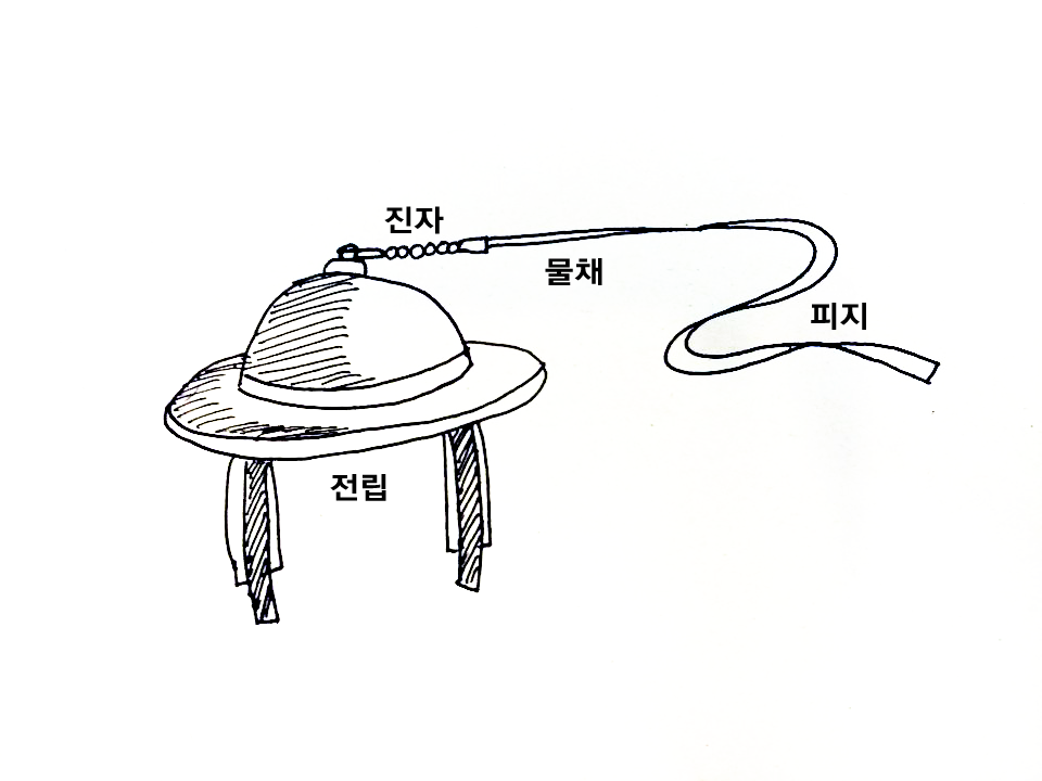 채상모